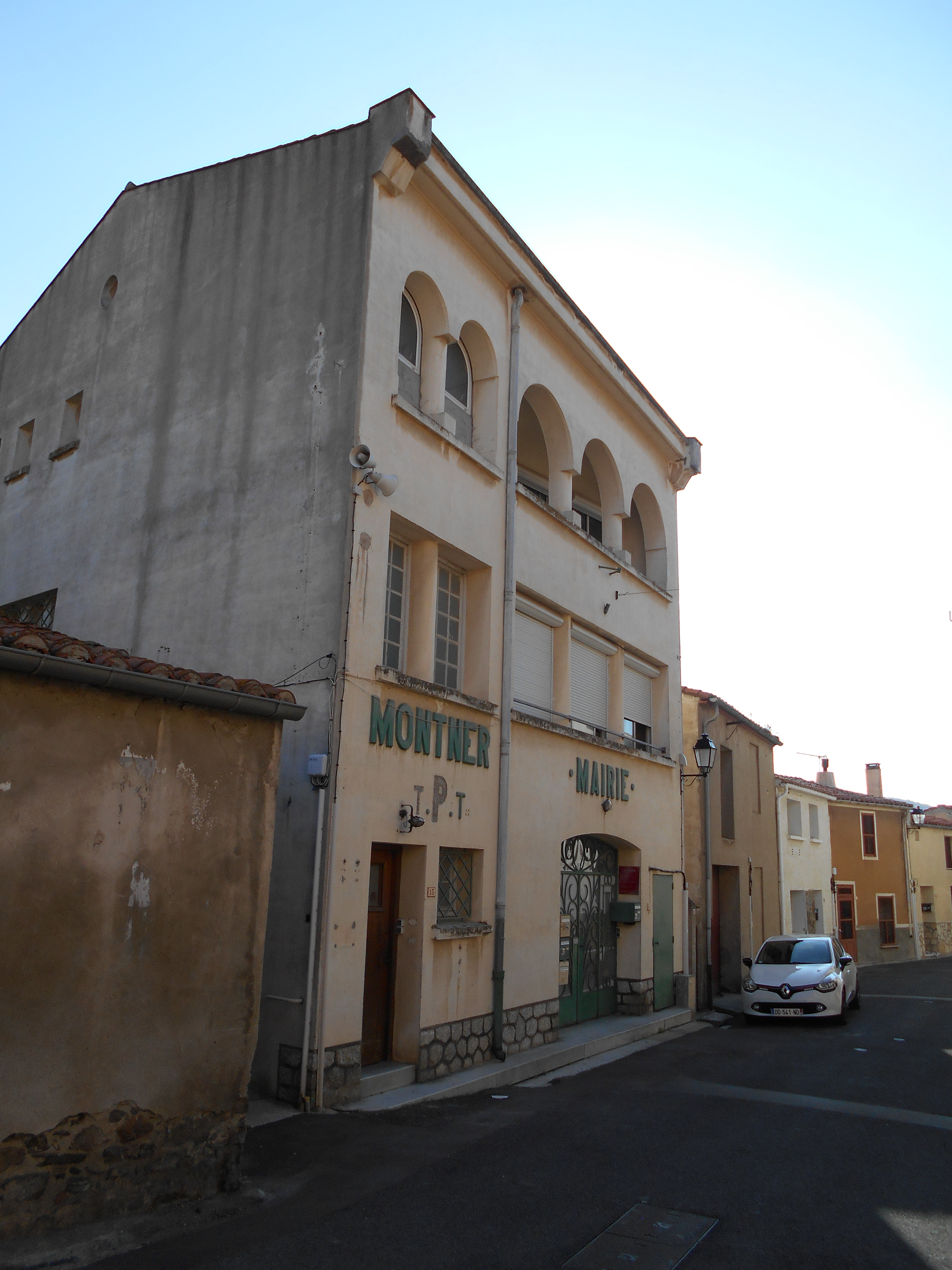 Antiga casa de la vila (la segona) de Montner